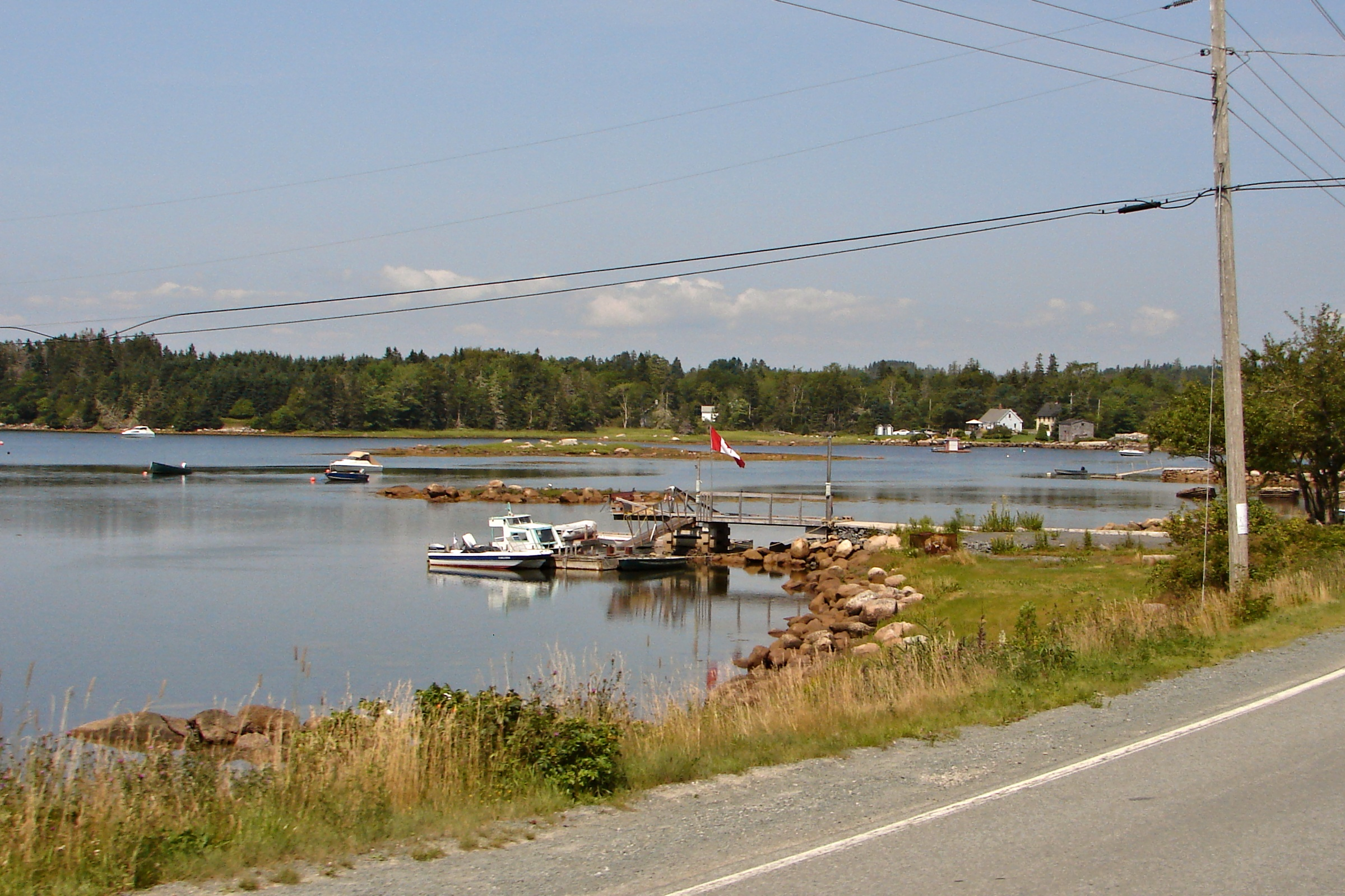 Glen Margaret, Nova Scotia, Canada